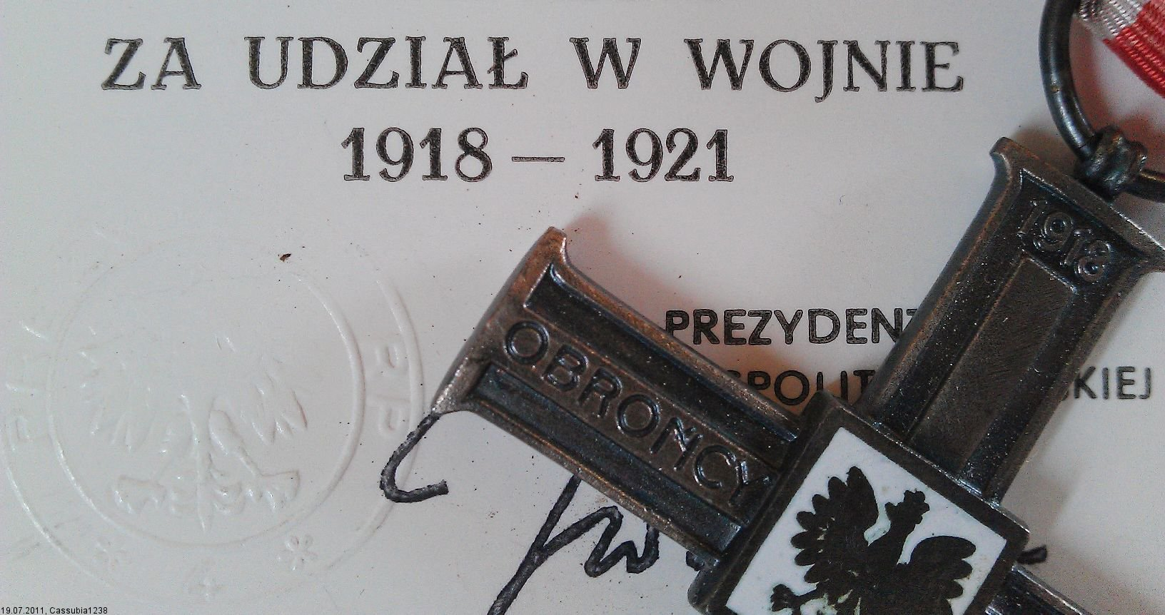 Kreuz für die Beteiligung am Krieg von 1918 - 1921